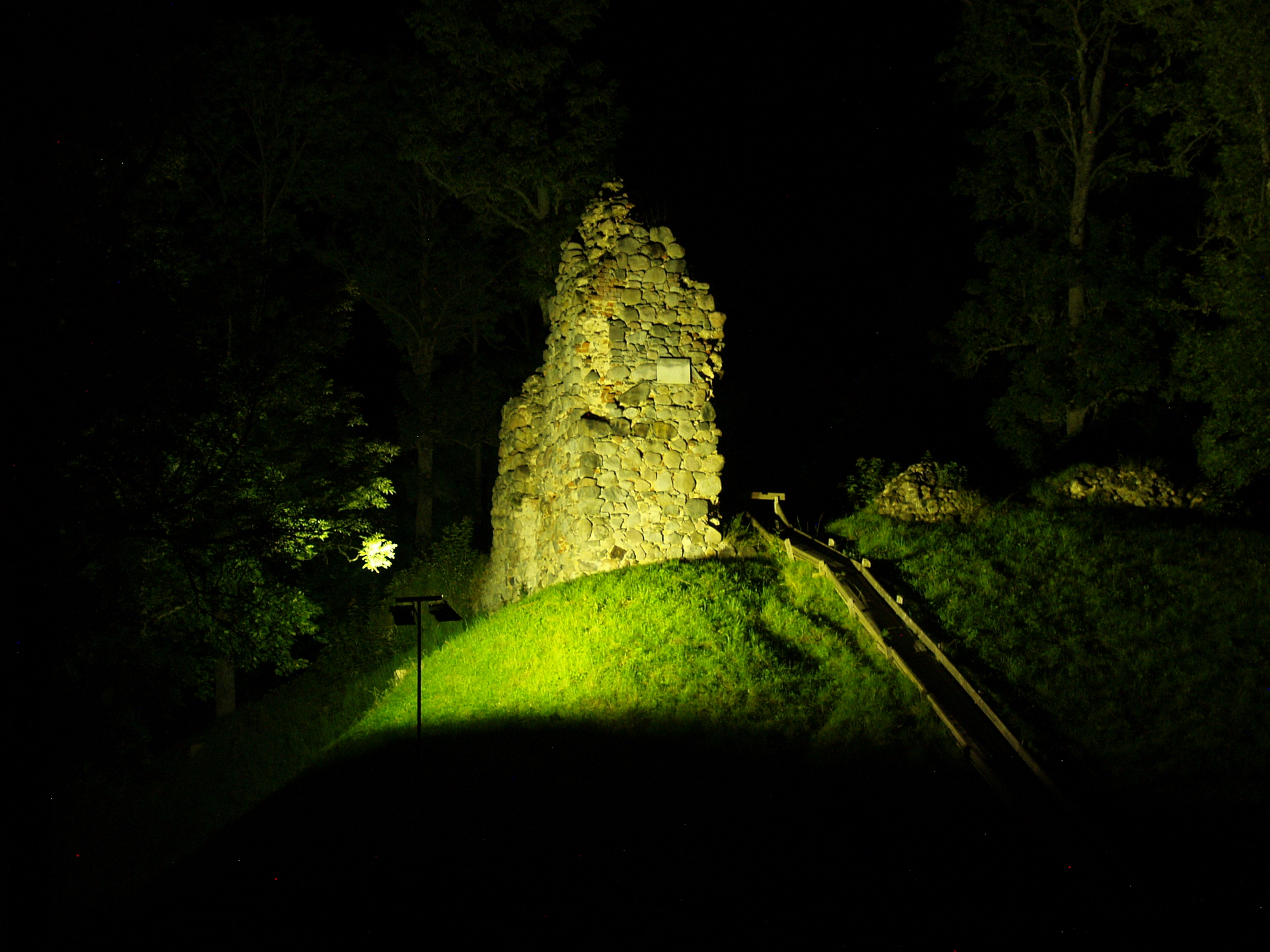 Helme ordulinnus